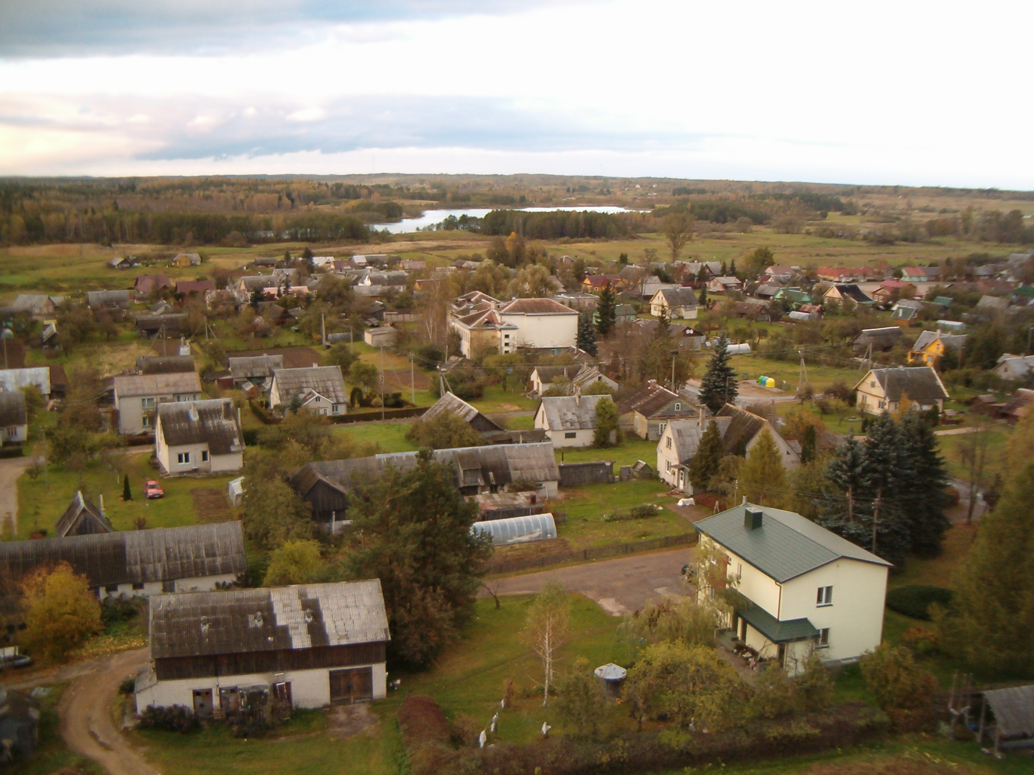 Onuškis, Lithuania